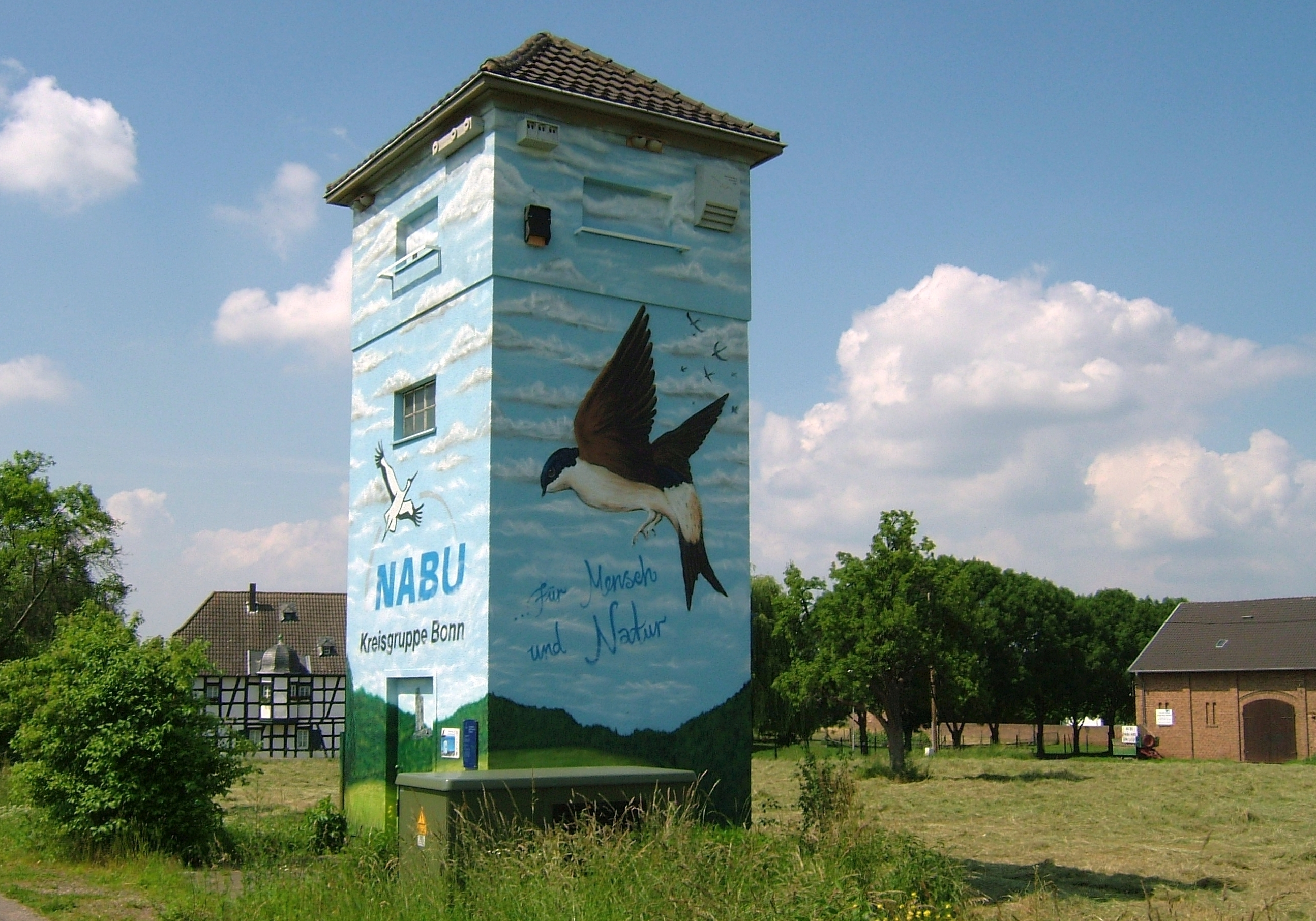 Wormersdorf – ehemaliges Transformatorenhäuschen (Trafoturmstation), jetzt Artenschutzturm des Naturschutzbunds (Nabu), Kreisgruppe Bonn. „Wohnanlage“ für bedrohte Vogelarten, Fledermäuse und Insekten. Standort: Klein-Altendorf